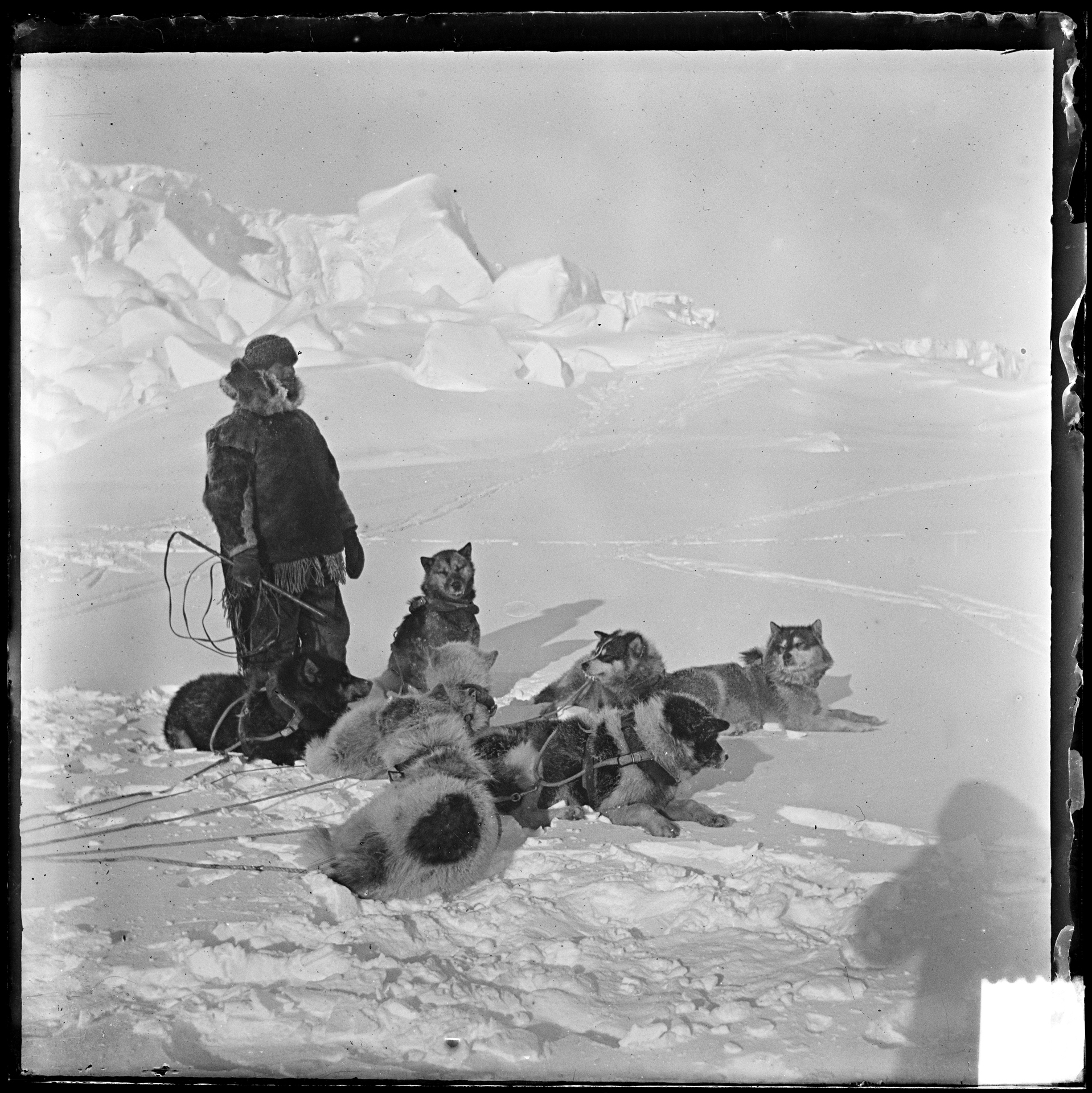 Tittel / Title: Helmer Hanssen med hundespann på seljakt Motiv / Motif: Negativ glassplate. Dato / Date: 1911-1912 Fotograf / Photographer: ukjent / unknown Sted / Place: Antarktis, Hvalbukta Eier / Owner Institution: Nasjonalbiblioteket / National Library of Norway Lenke / Link: Bildesignatur / Image Number: bldsa_NPRA1094